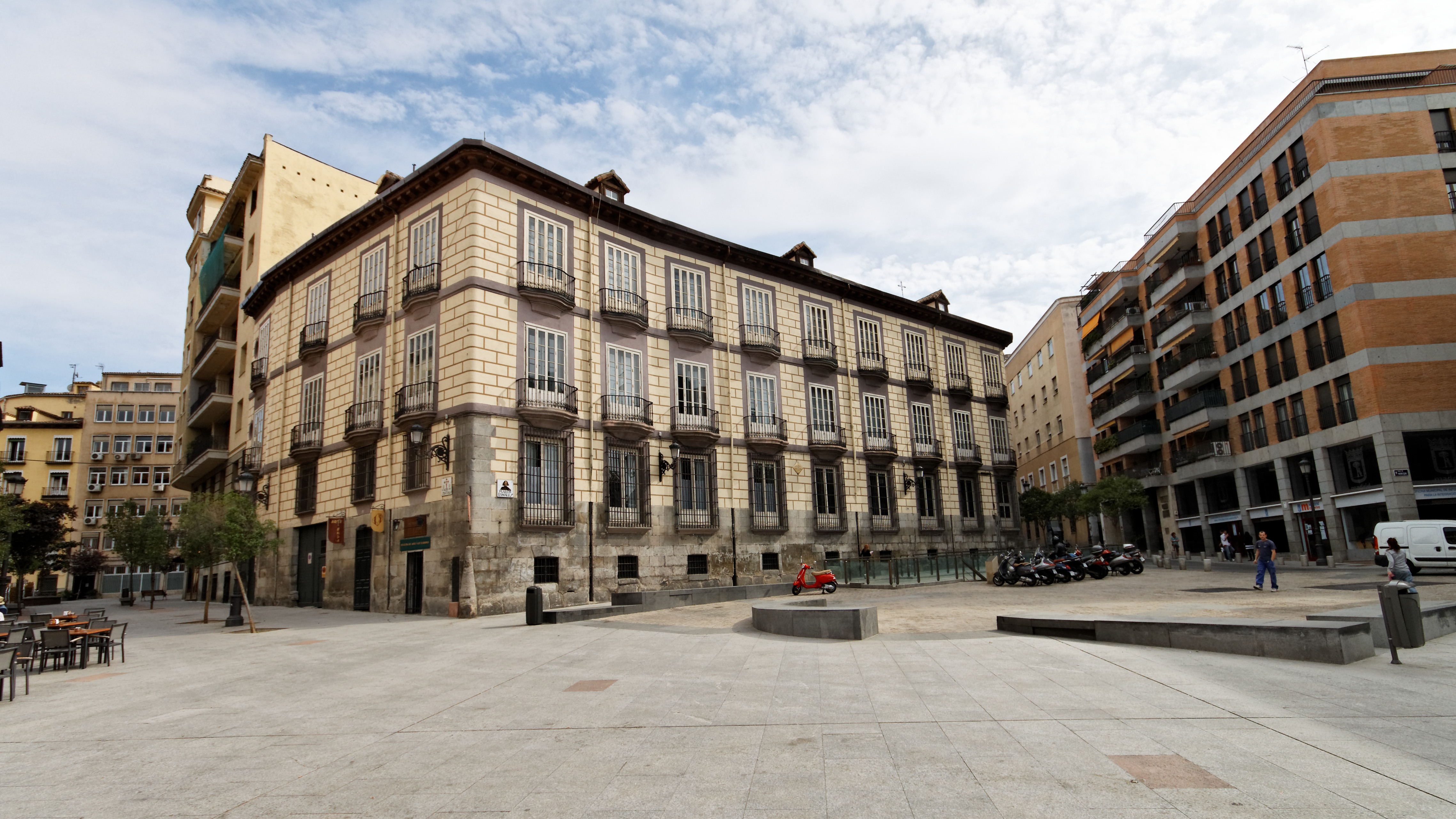 Casa-palacio de Domingo Trespalacios, obra del arquitecto Andrés Díaz Carnicero, fechada en 1768. Madrid.